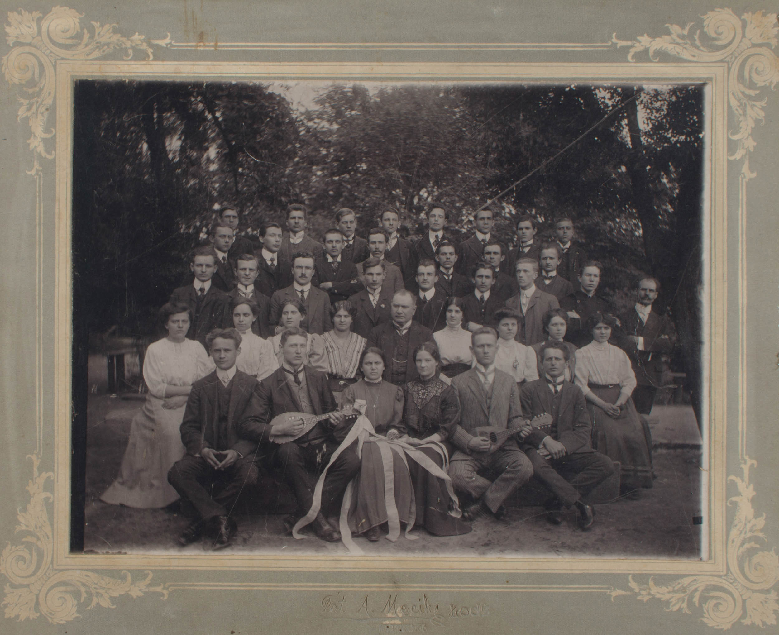 Fotografia grupowa przedstawiająca kobiety i mężczyzn w plenerze, członków Stowarzyszenia Śpiewaczego „Echo”. Dwóch mężczyzn na pierwszym planie trzyma w dłoniach instrumenty muzyczne (mandolinyu). Stowarzyszenie Śpiewacze „Echo” powstało w 1876 r. z inicjatywy klasowych związków zawodowych przy kościele Podwyższenia św. Krzyża w Łodzi jako chór męski pod nazwą „Chór Polski”. W 1925 r. zmieniło nazwę na Stowarzyszenie Śpiewacze „Echo”. W 1981 r. powołano chór żeński, który jest kontynuatorem tradycji stowarzyszenia.